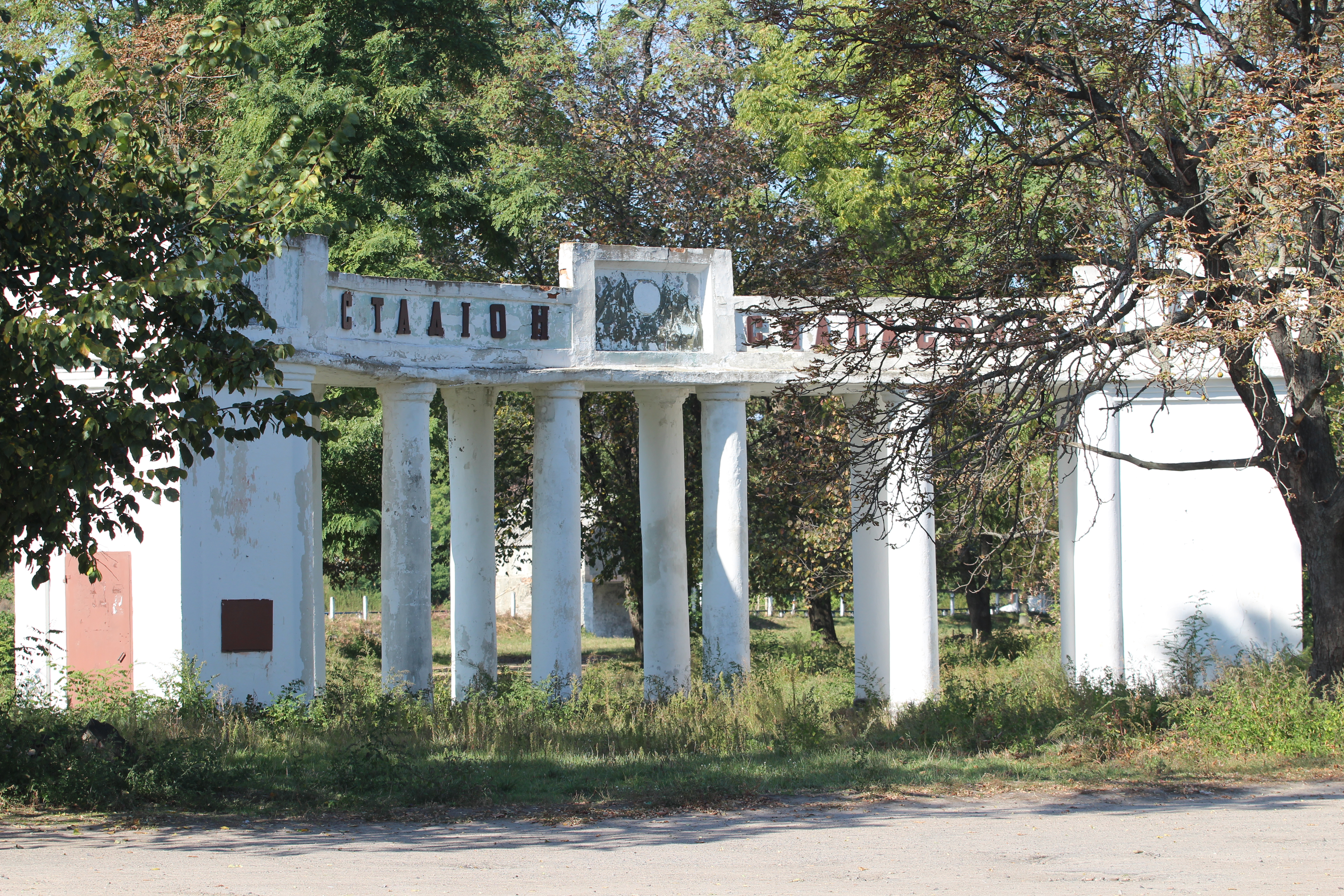 Стадіон (зміш.), с. Чапаївка